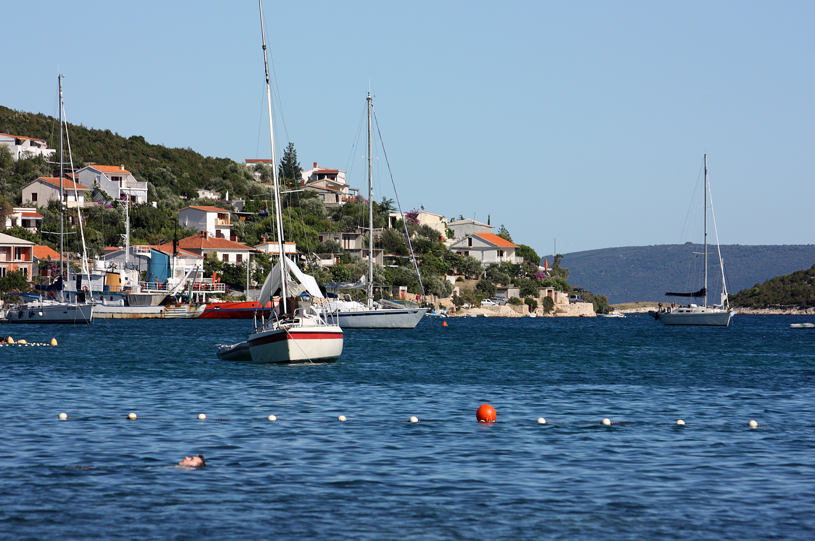 Vinisce